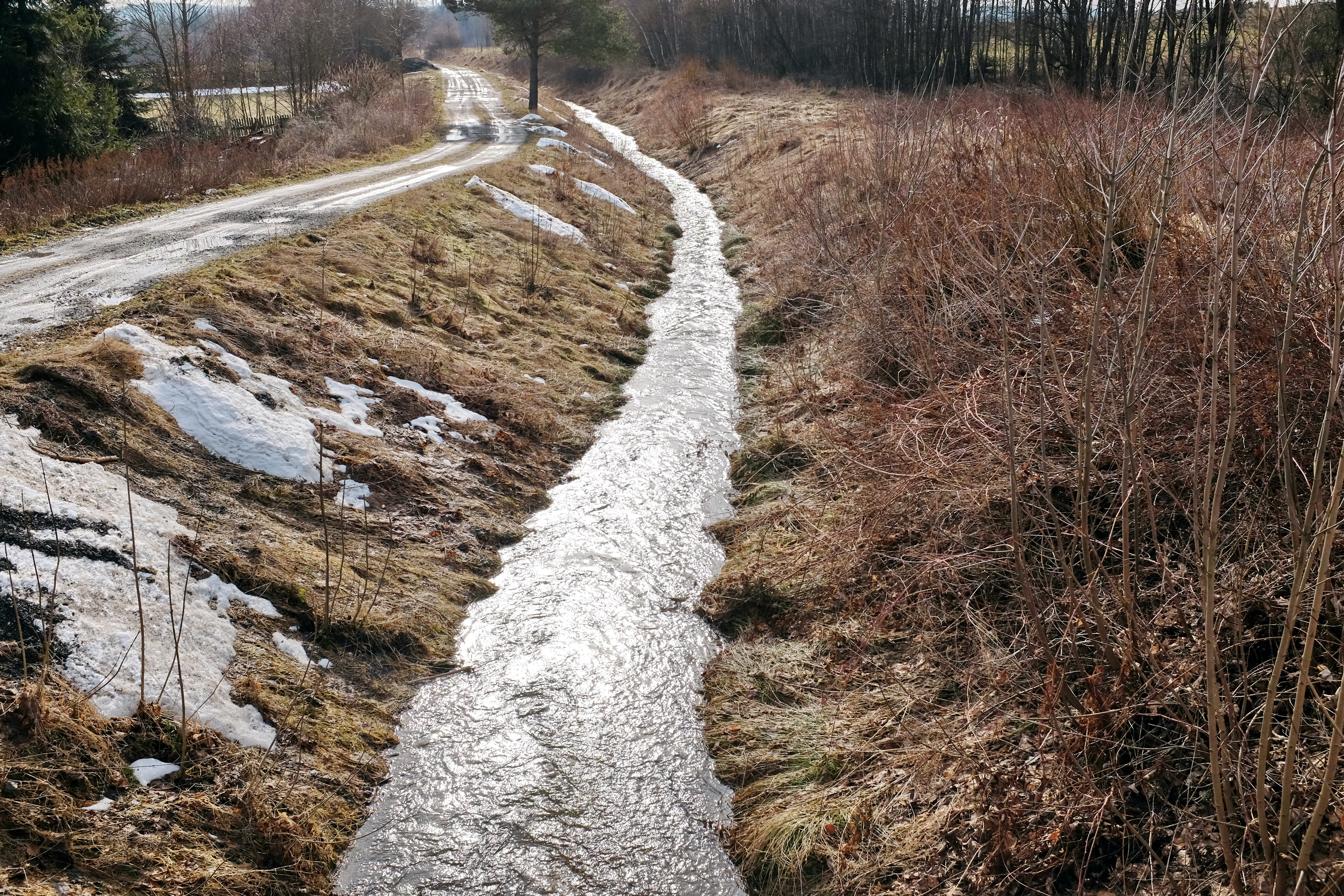 Hluboký potok pod Boučím, Krušné hory, okres Sokolov